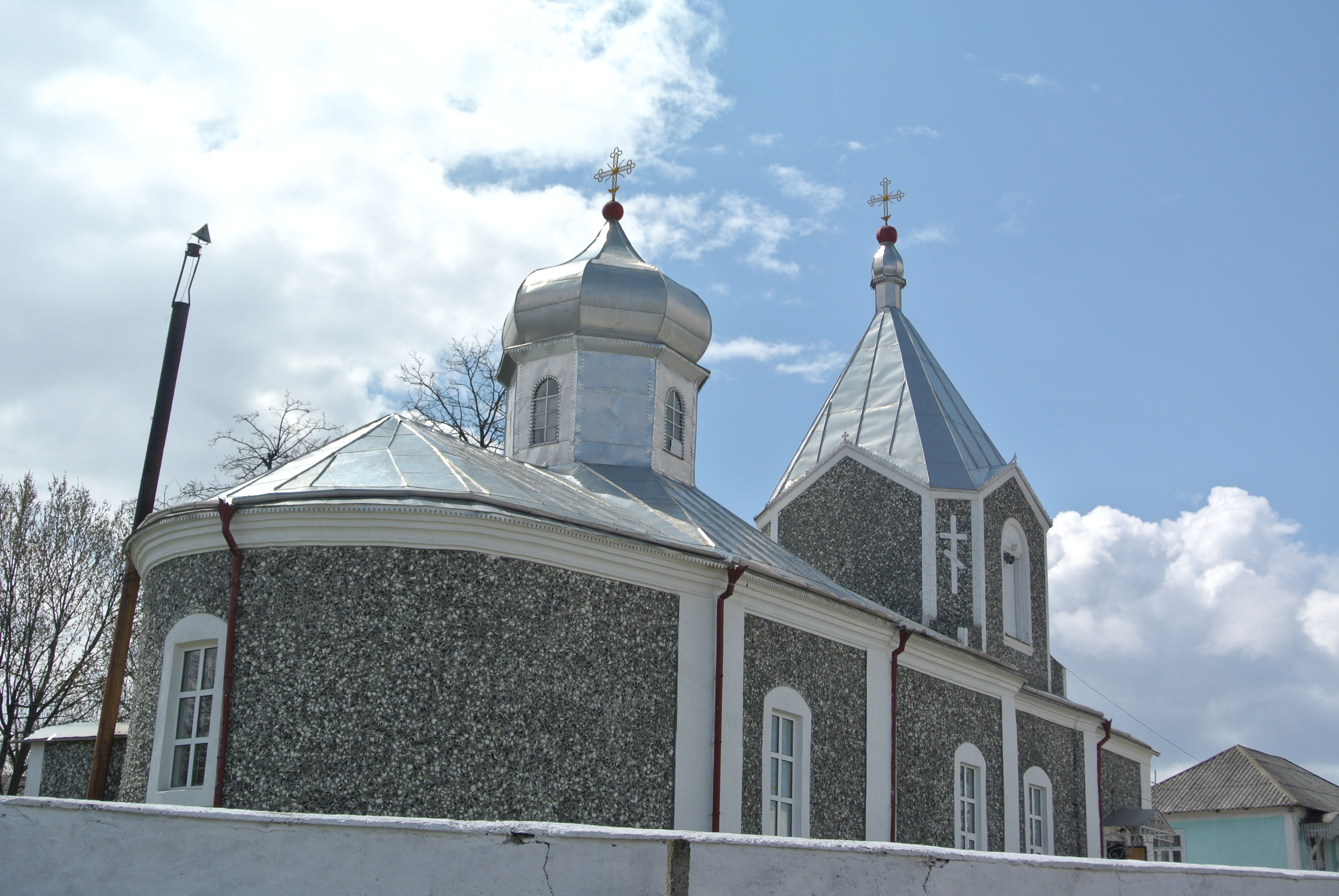 Biserica din Baxani dupa reconstructie. 2015.